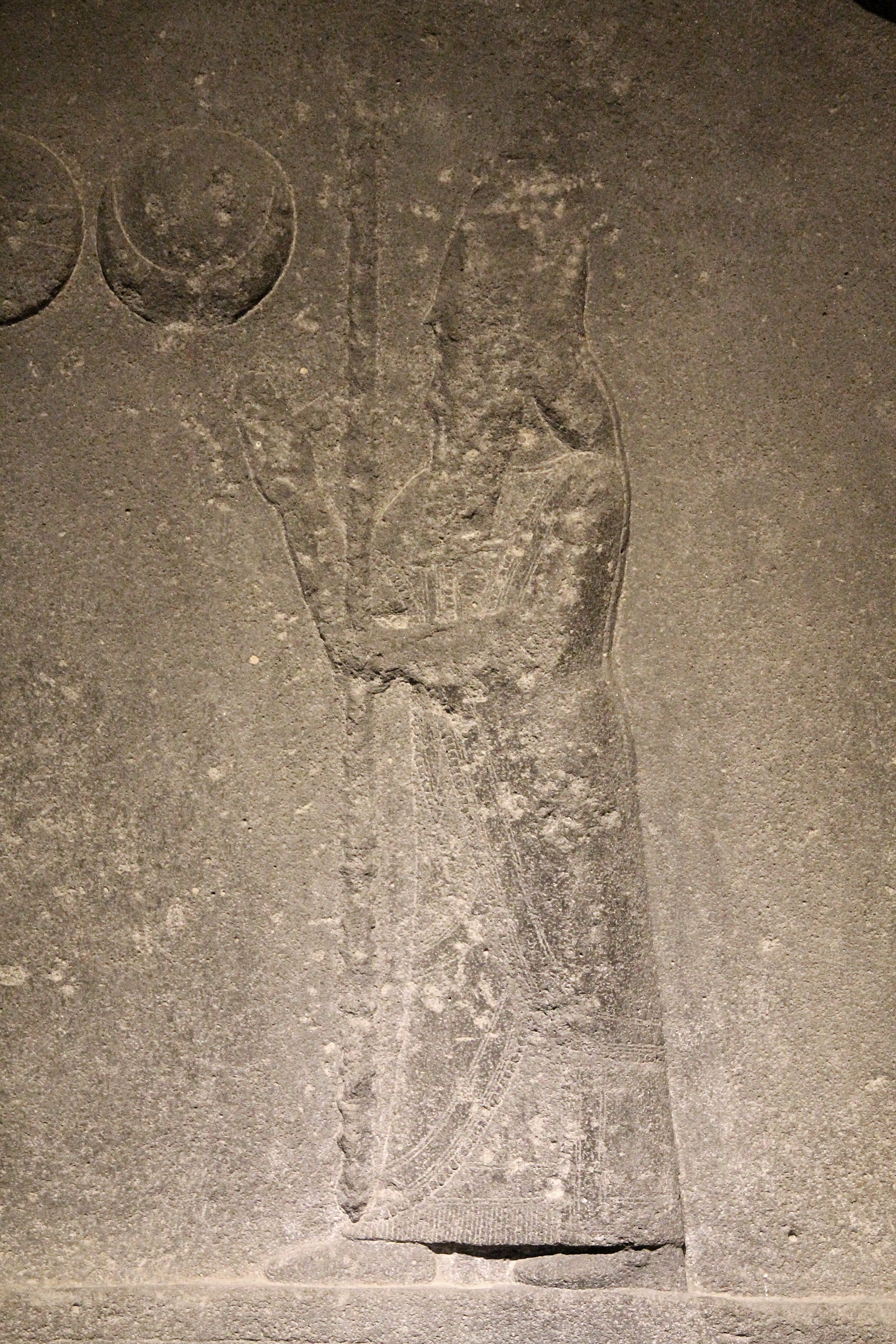 Archäologisches Museum Şanlıurfa, Südosttürkei, Stele des Nabonid aus Harran, Ausschnitt